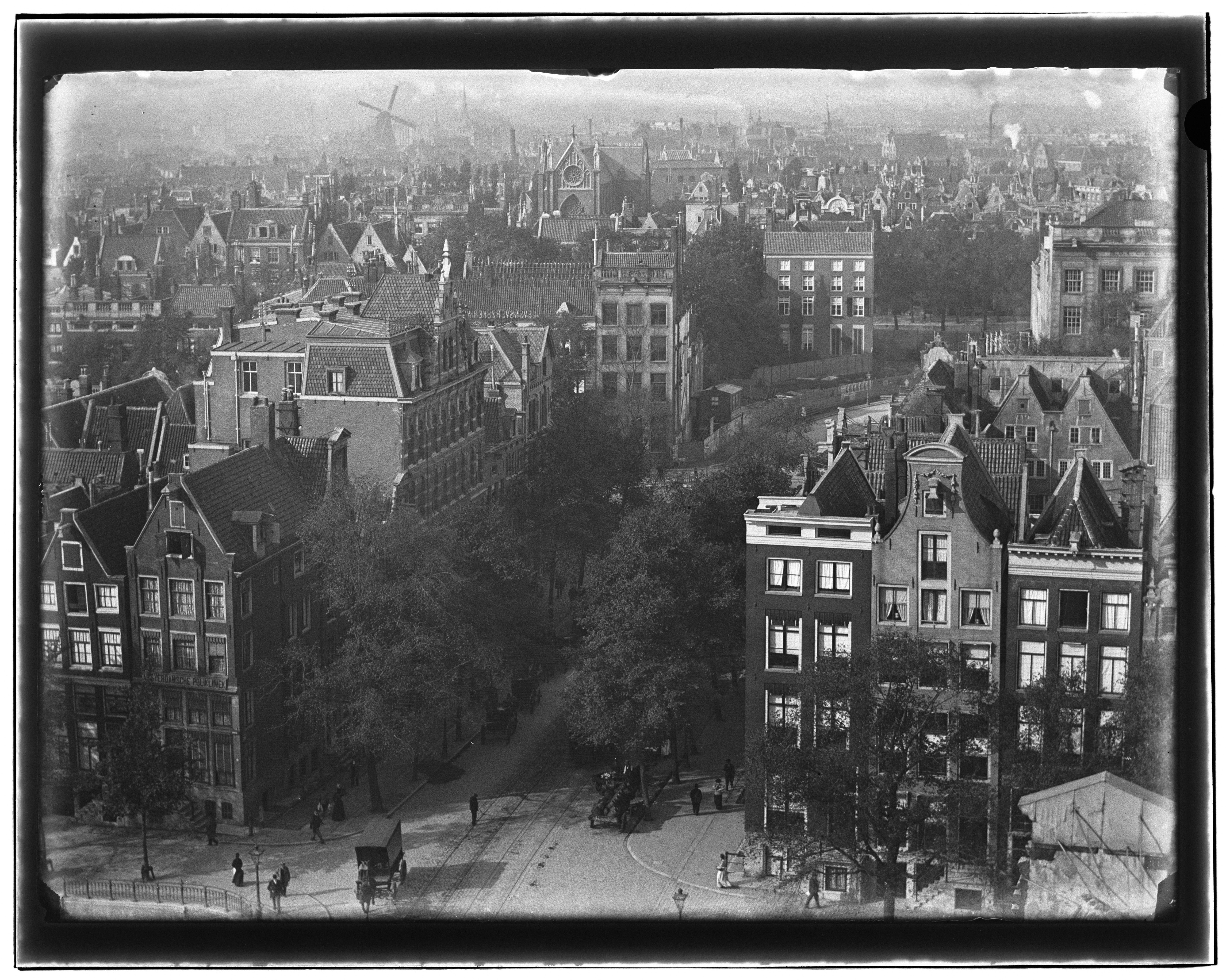 Beschrijving Raadhuisstraat 9-11-13 enz. (v.l.n.r. links) Panorama vanaf het dak van het Hoofd Post- en Telegraafkantoor (architect C.H. Peters``, 1895) in westelijke richting naar Singel 238 t/m 244 (ged.) (v.r.n.l.) en Herengracht. Documenttype foto Vervaardiger Olie``, Jacob (1834-1905) Collectie Collectie Jacob Olie Jbz. Datering 6 oktober 1897 Geografische naam Raadhuisstraat Inventarissen Afbeeldingsbestand 10019A000069 Generated with Dememorixer